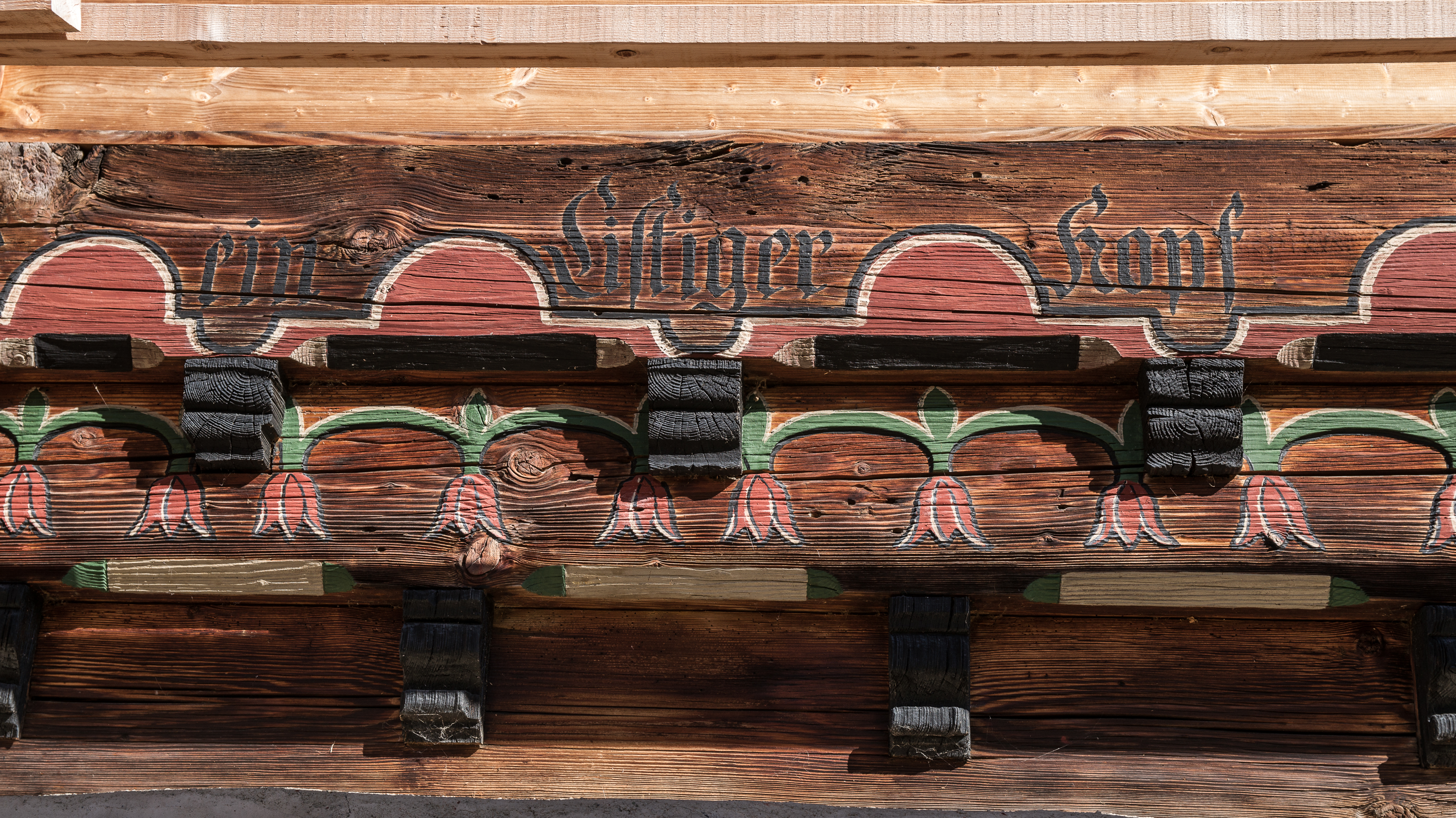 Vennerhaus, Büel 201, Fassadendetail, Inschrift "Ein listiger Kopf"